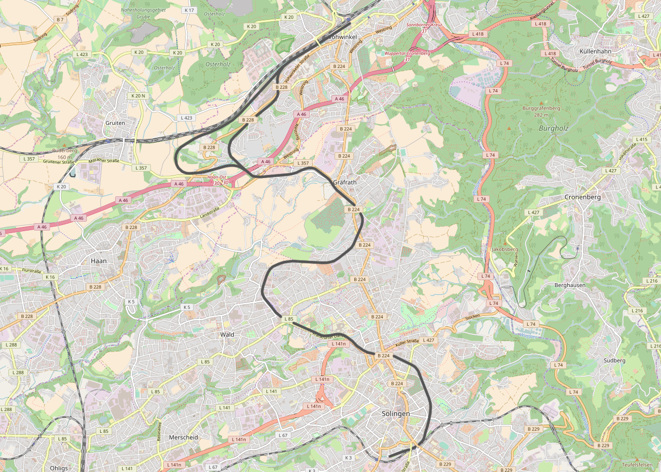 DB 2734, Solingen - Wuppertal-Vohwinkel